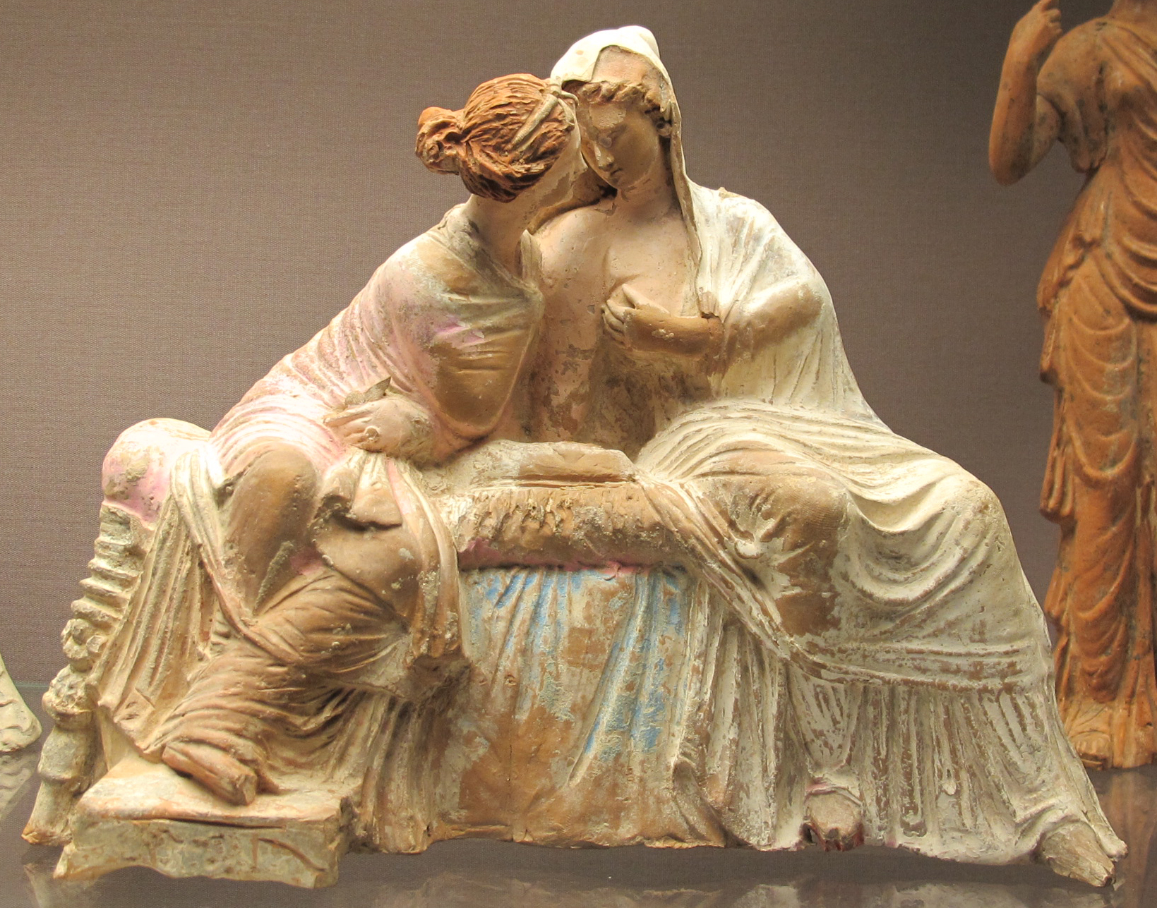 Myrina, due donne sedute, 100 ac. ca